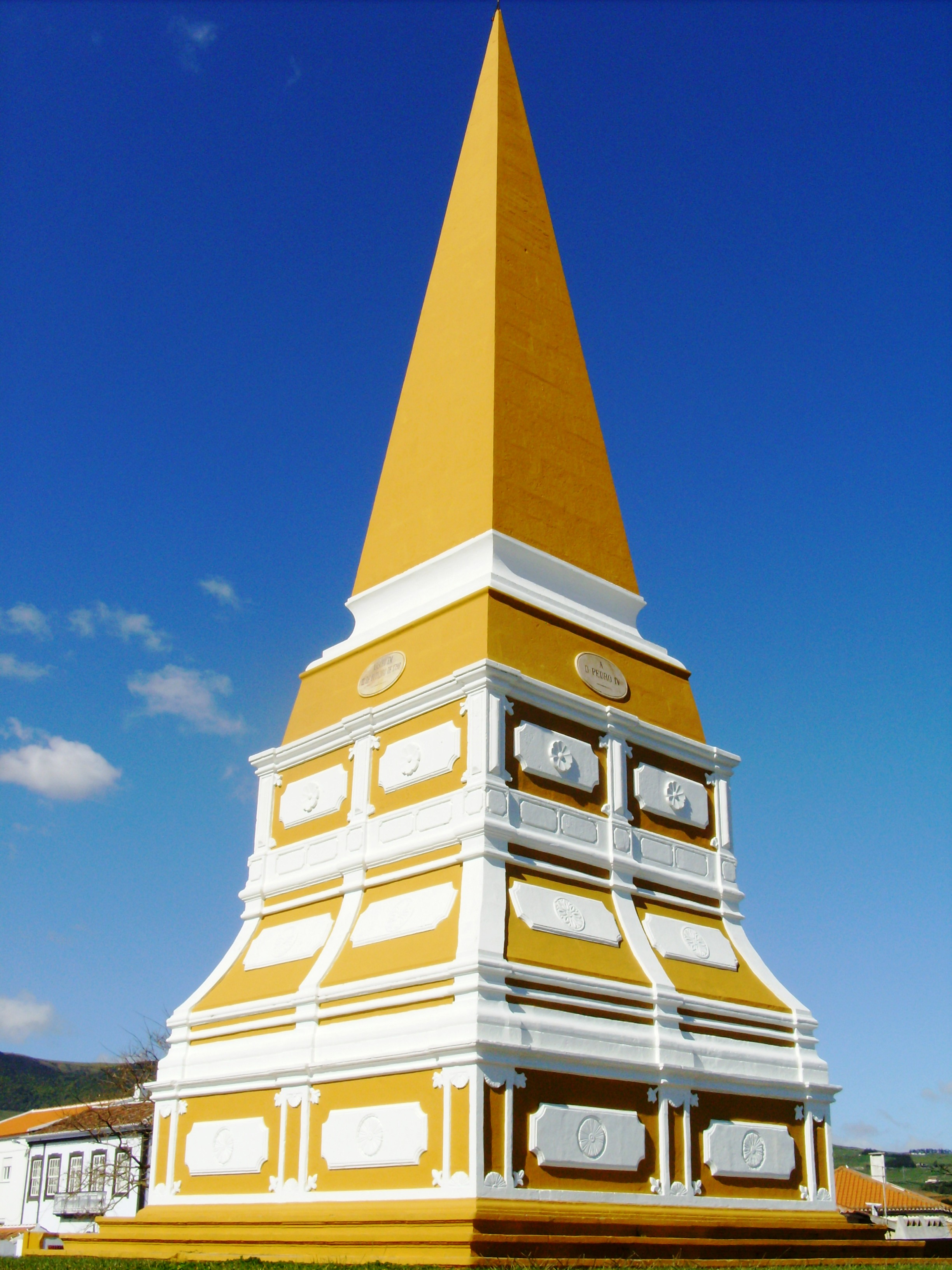 Castelo de São Luís, Angra do Heroísmo, Ilha Terceira, Açores: detalhe do monumento em memória de D. Pedro IV de Portugal.